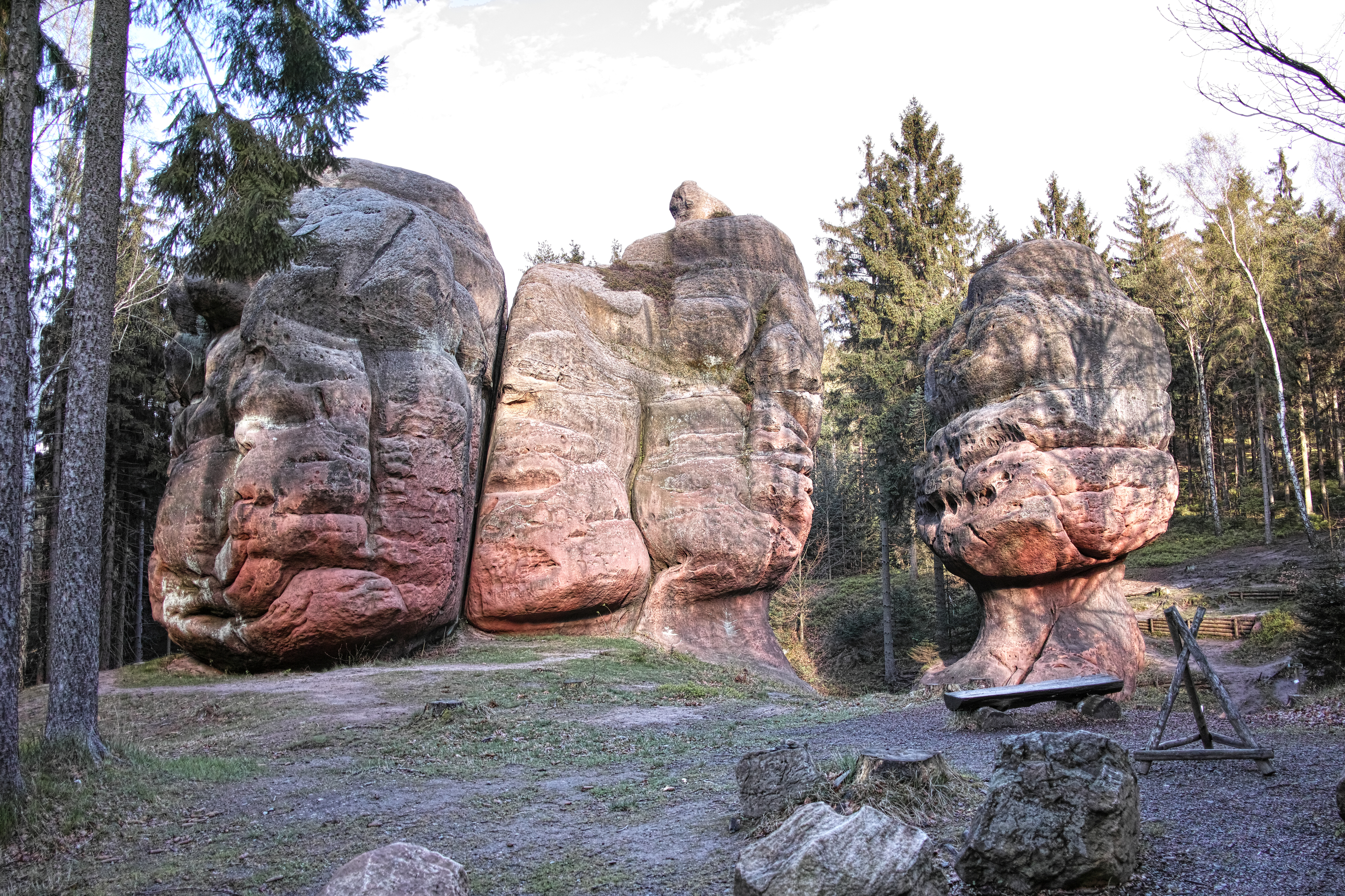 Naturdenkmal Kelchsteine Westseite bei Oybin im Zittauer Gebirge in der Abendsonne